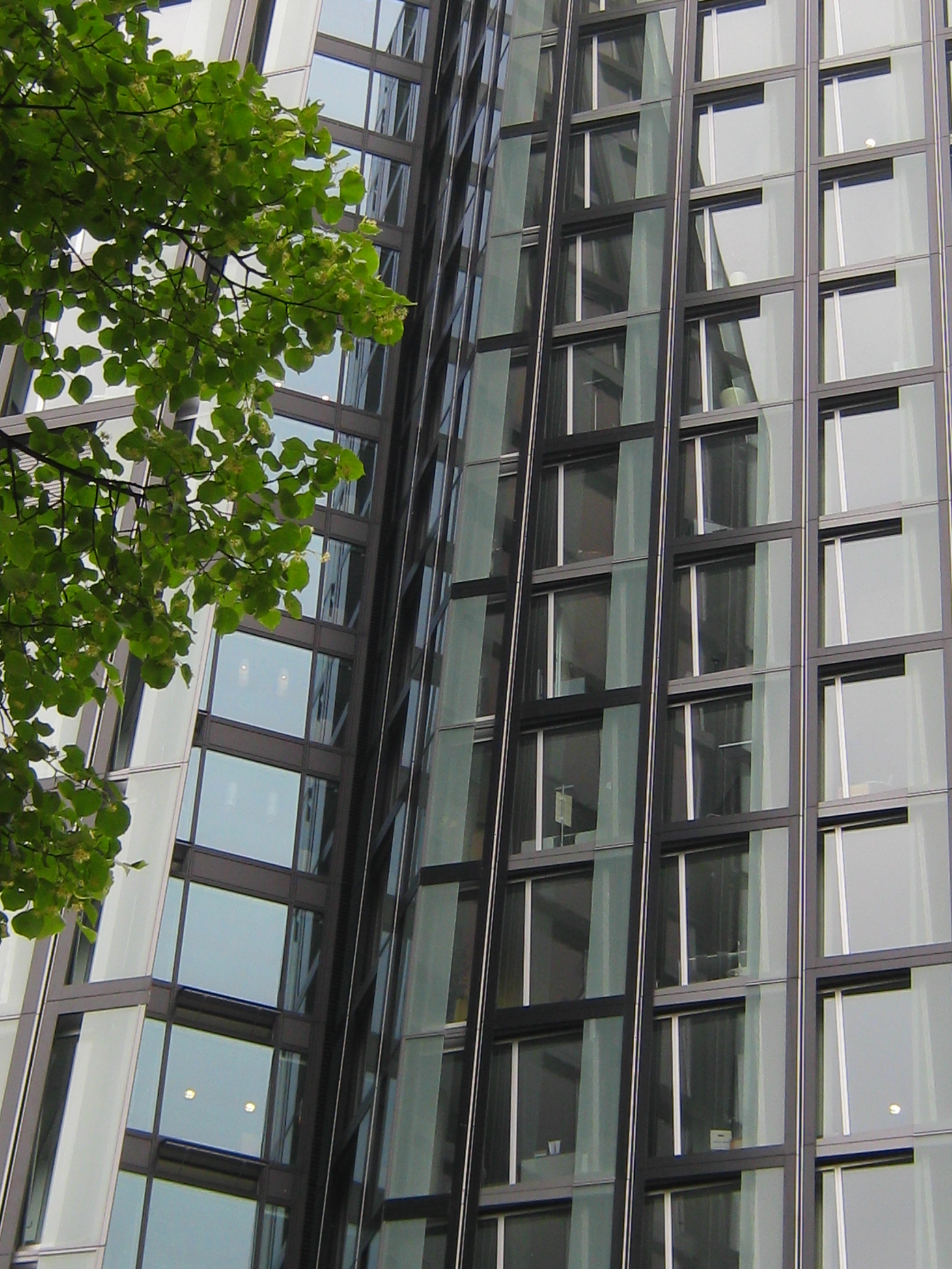 Fotografischer Ausschnitt aus der Ostfassade der sog. Tanzenden Türme in Hamburg-St. Pauli